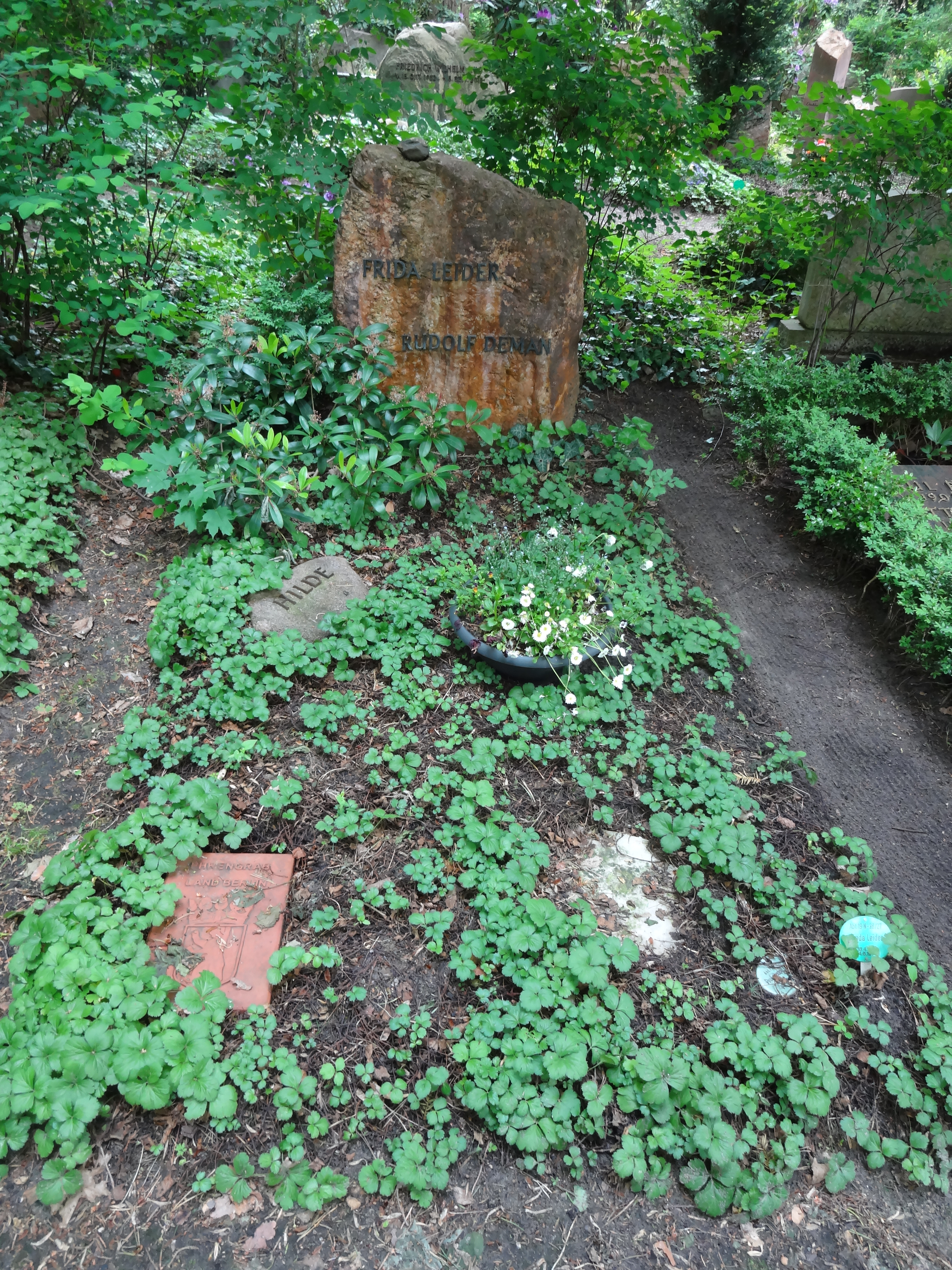 Ehrengrab von Frida Leider und ihrem Ehemann Rudolf Deman auf dem Friedhof Heerstraße in Berlin